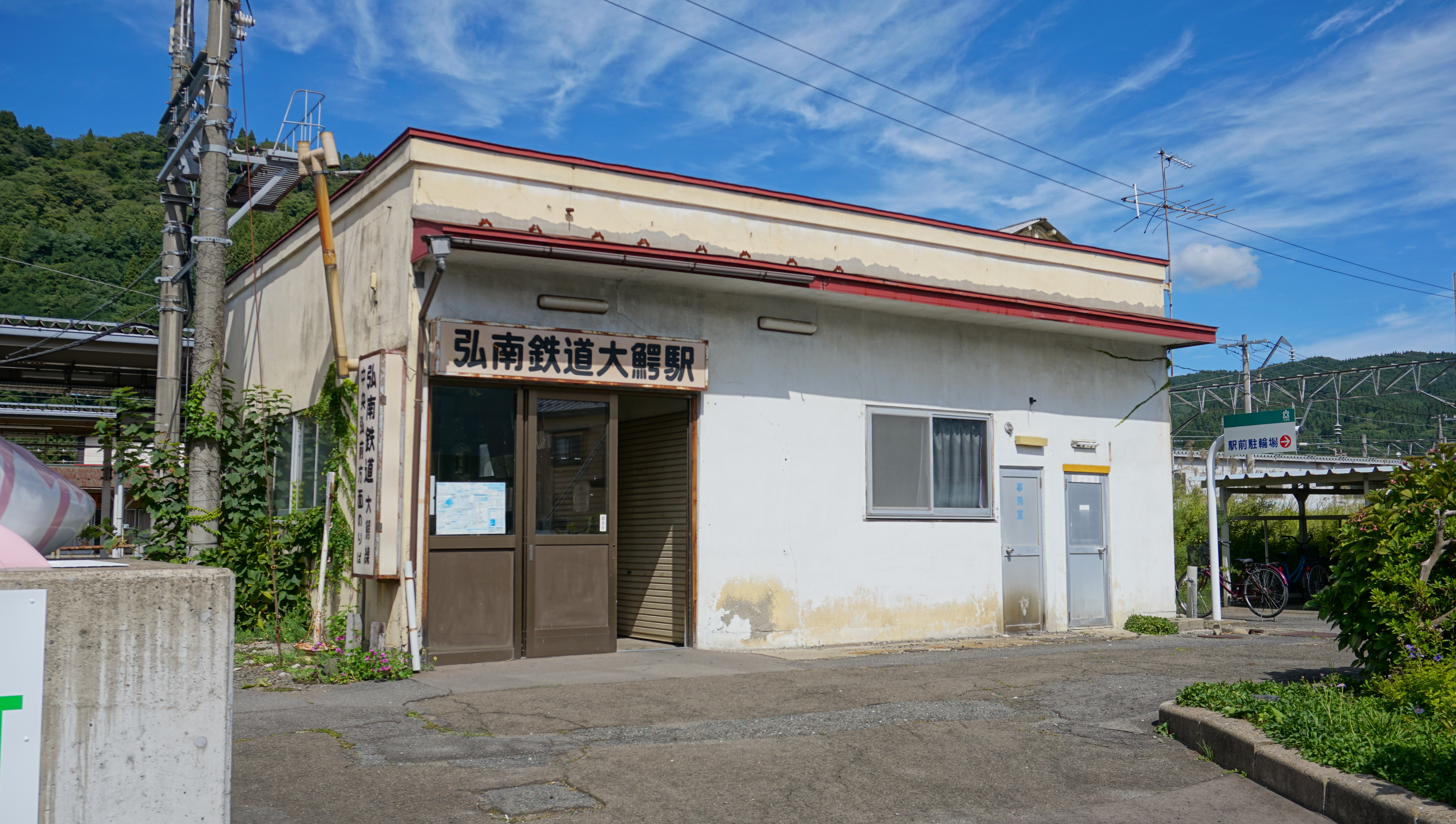 弘南鉄道大鰐線 大鰐駅。JRの大鰐温泉駅に隣接するが、JR駅が大鰐から大鰐温泉に改称したのに対しこちらは改称しなかったため、駅名が異なる。